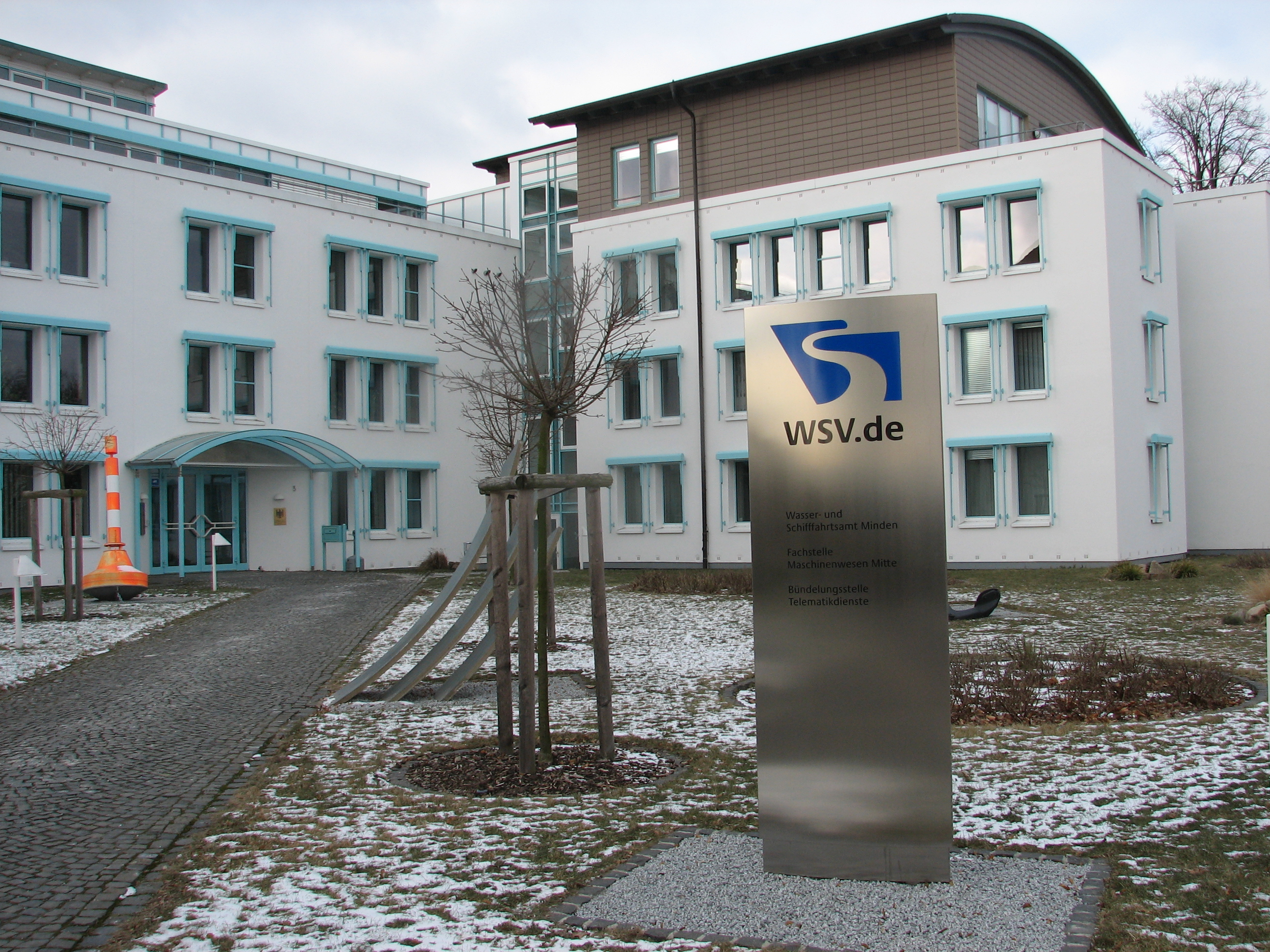 Das Wasser- und Schifffahrtsamt Minden und die Fachstelle Maschinenwesen Mitte